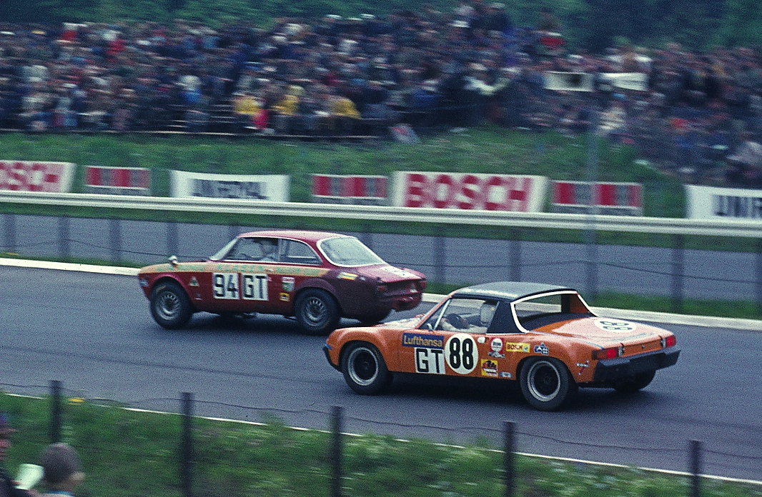 Porsche 914-6 von Robert Huhn/Günther Schwarz (Nr. 88) und Alfa Romeo GTA von Peter Otto/Jörg Klasen beim 1000-km-Rennen 1970 auf dem Nürburgring eingangs Südkehre. Huhn/Schwarz wurden Neunzehnte im Gesamtklassement und Zweite in der GT-Klasse bis 2 Liter Hubraum. 36 Runden in 6:06:53,000 Stunden